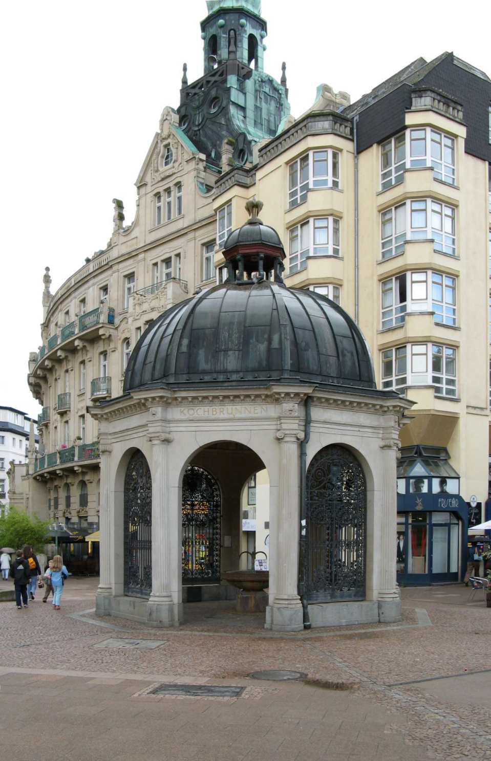 Pavillon des Kochbrunnen am Kranzplatz in Wiesbaden, Hessen, Deutschland